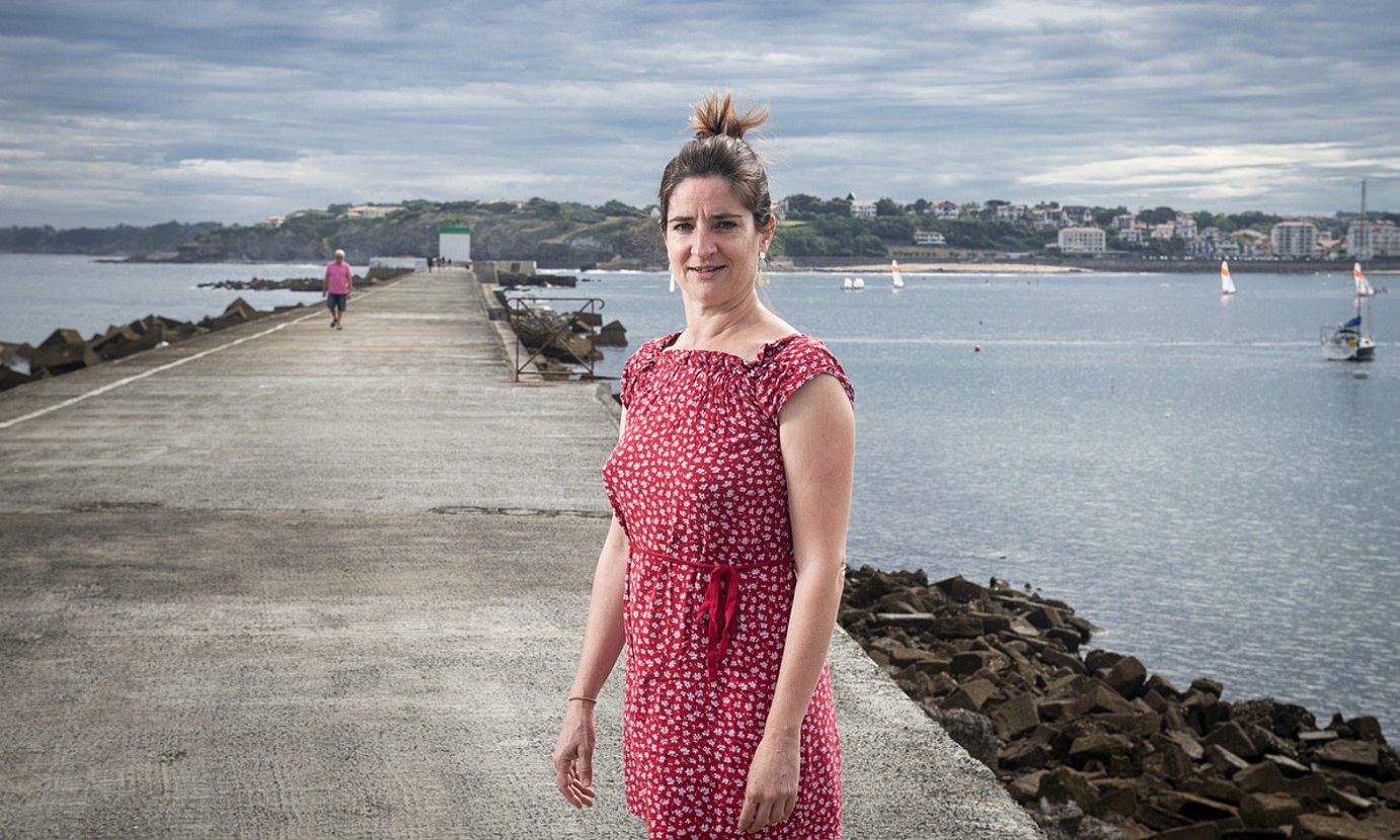 Pantxika Telleria,Zokoako Artha harresian 2020. Berrian argitaratutako Gillaume Fauveau-ren argazkia.